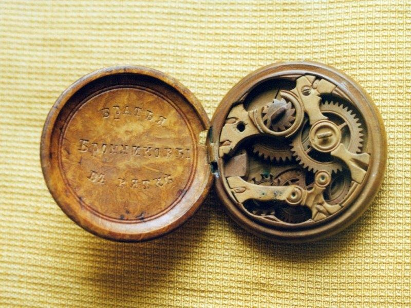 Деревянные часы Бронникова (из фондов Кировского областного краеведческого музея)